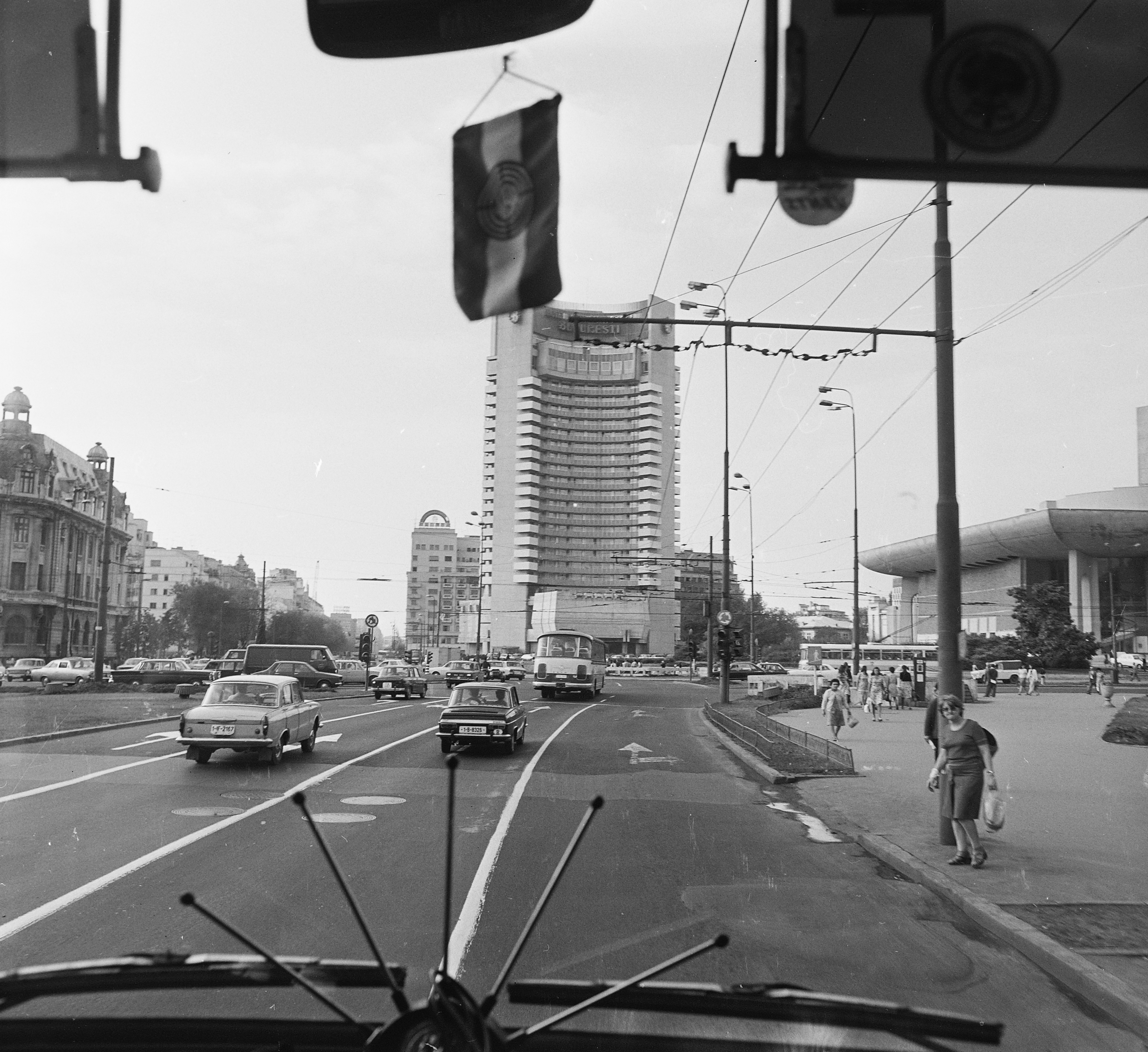 Egyetem tér (Piata Universităţii), háttérben a Hotel Intercontinental Bucharest. Location: Romania, Bucharest Tags: high-rise building, hotel, street view, automobile, bus Title: Egyetem tér (Piata Universităţii), háttérben a Hotel Intercontinental Bucharest.